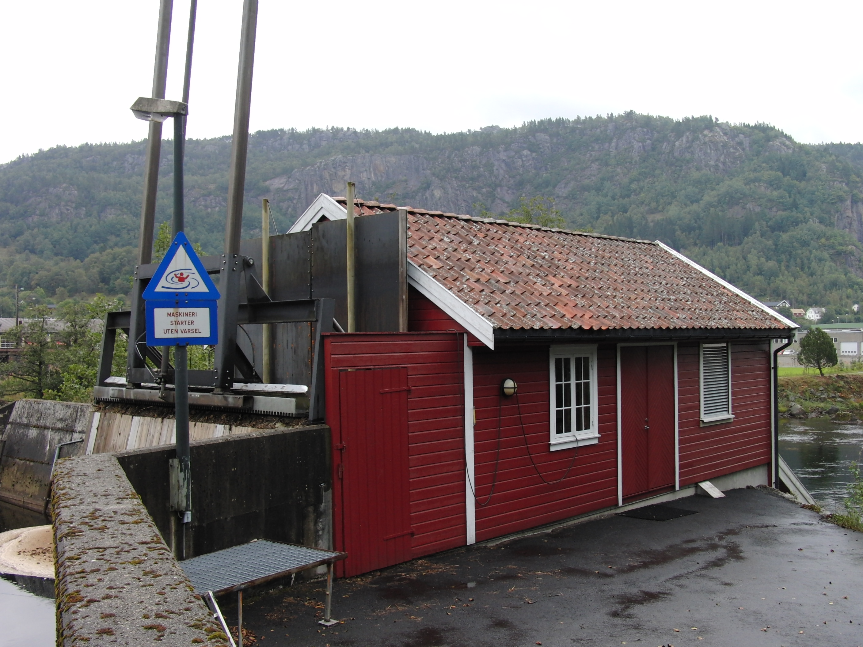 Moi kraftverk 2014